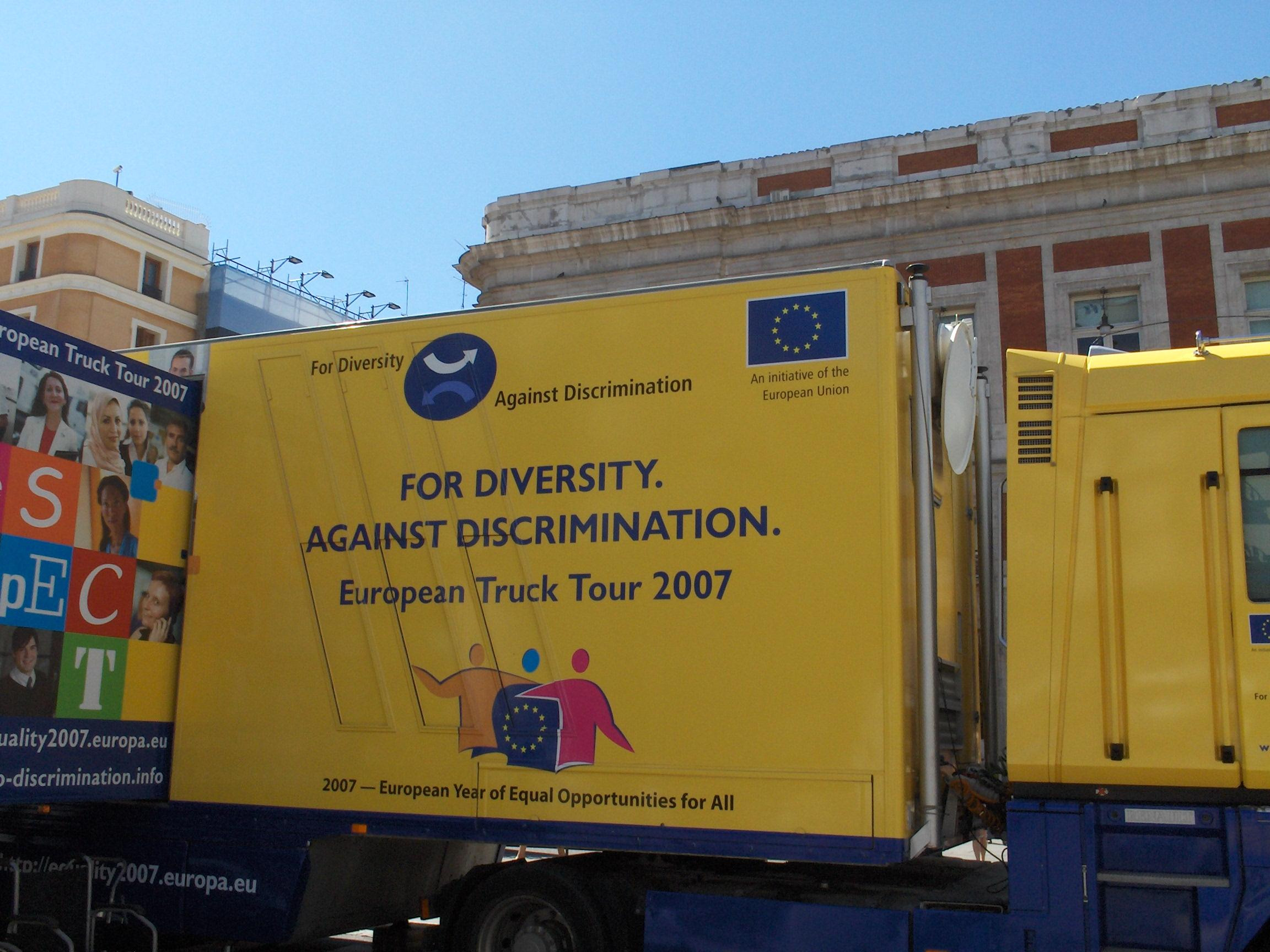 Madrid, España, 2007 - instantaneas